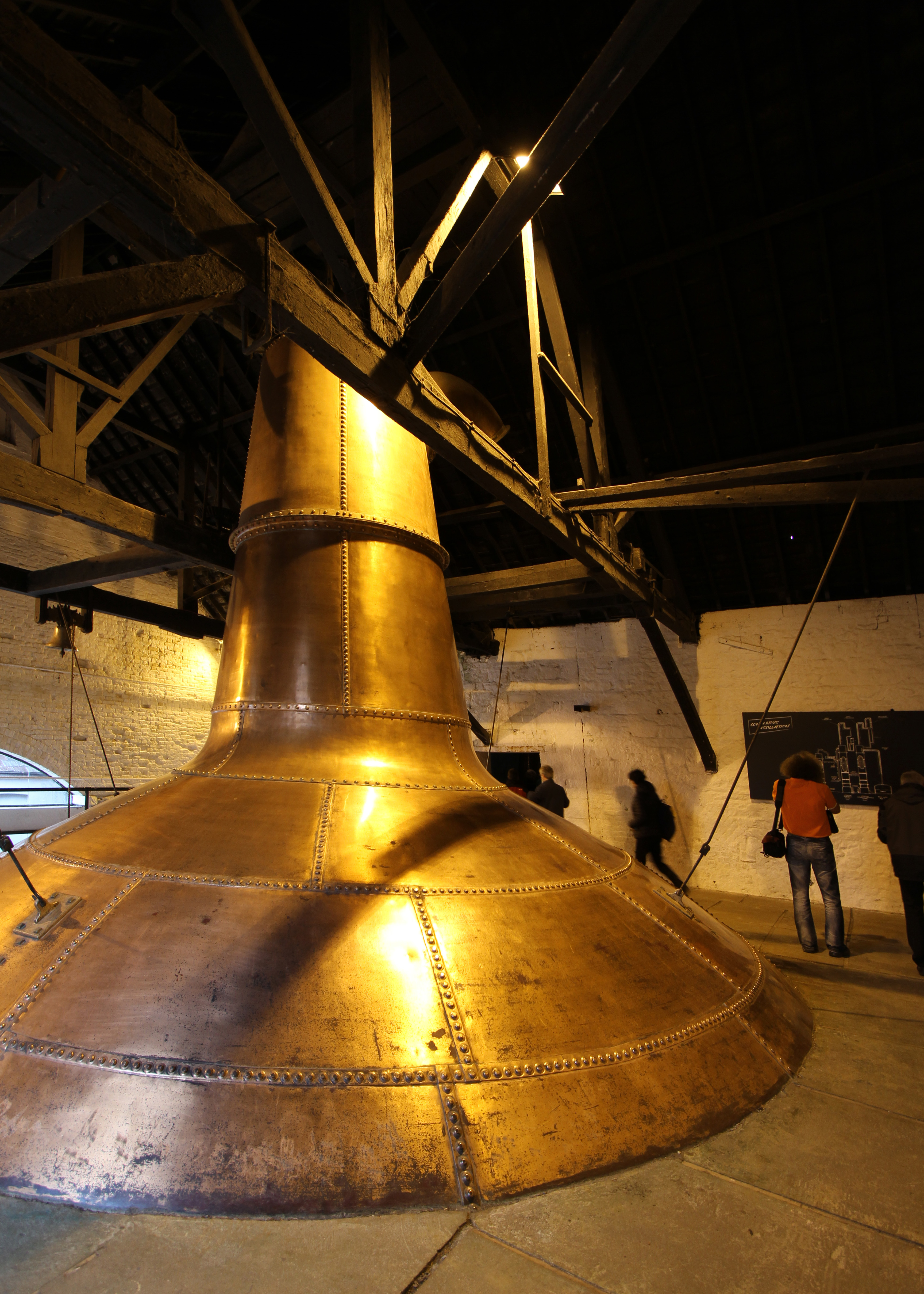 Jameson Whiskey Distillery in Midleton